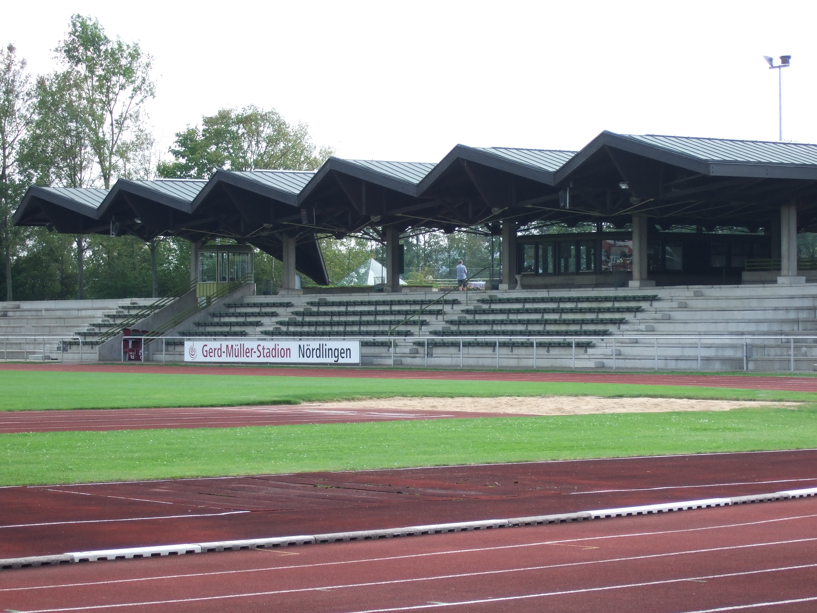 Gerg Müller Stadion